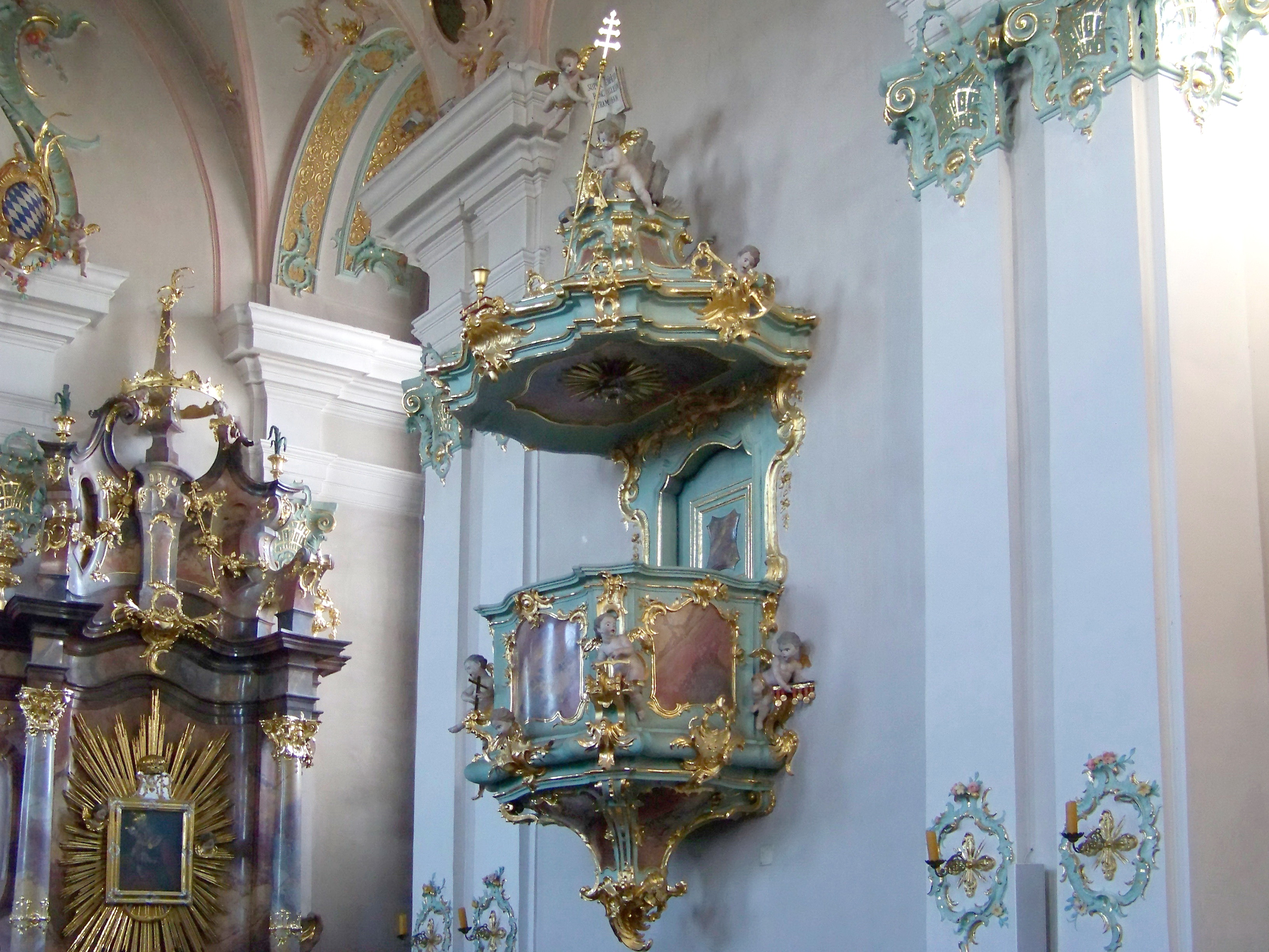 Geiselhöring, Schlossgraben 17. Katholische Stadtpfarrkirche St. Petrus und Erasmus. Barockes Langhaus, 1761-64 von Georg Fischer, Chor und Turmuntergeschosse mittelalterlich, Obergeschoss 1776; mit Ausstattung. Rokokokanzel mit Muschelwerkverzierung in mintgrüner Farbe.